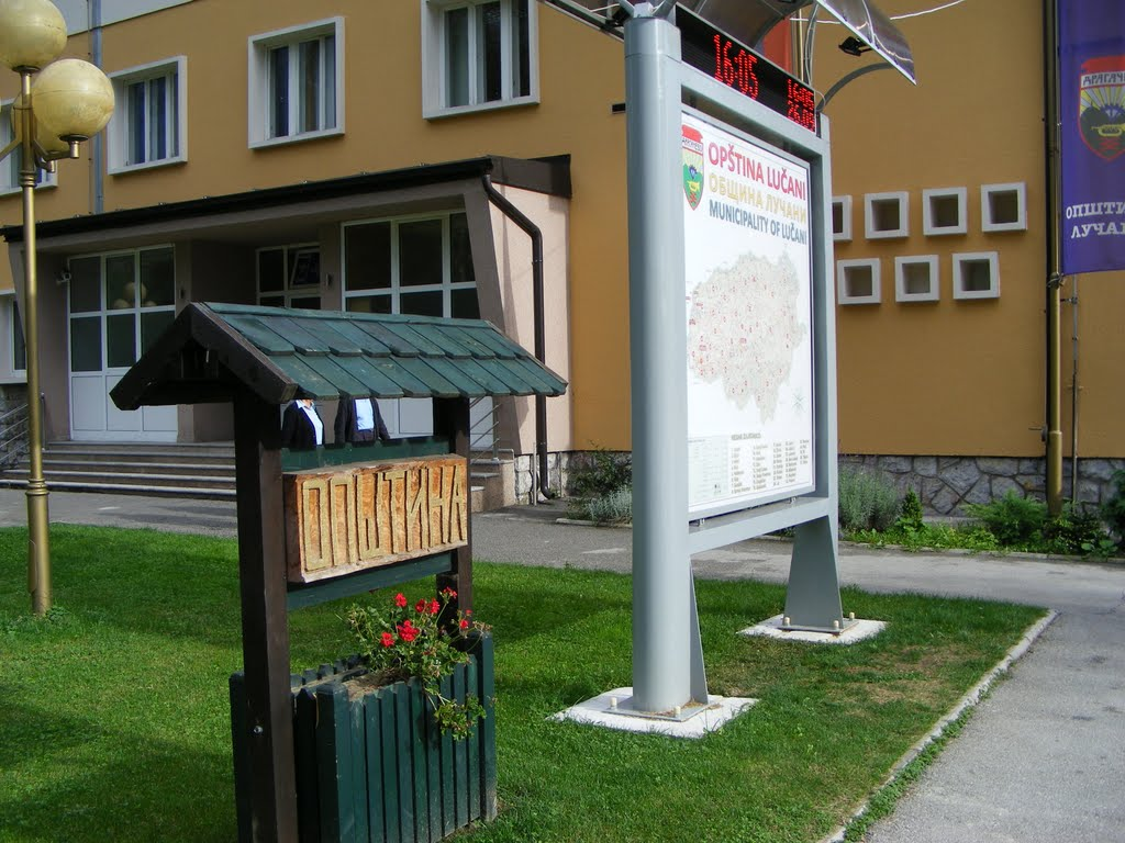 Ulaz u zgradu opštine Lučani. 26.09.2010. Autor: Cogoljevic Branko